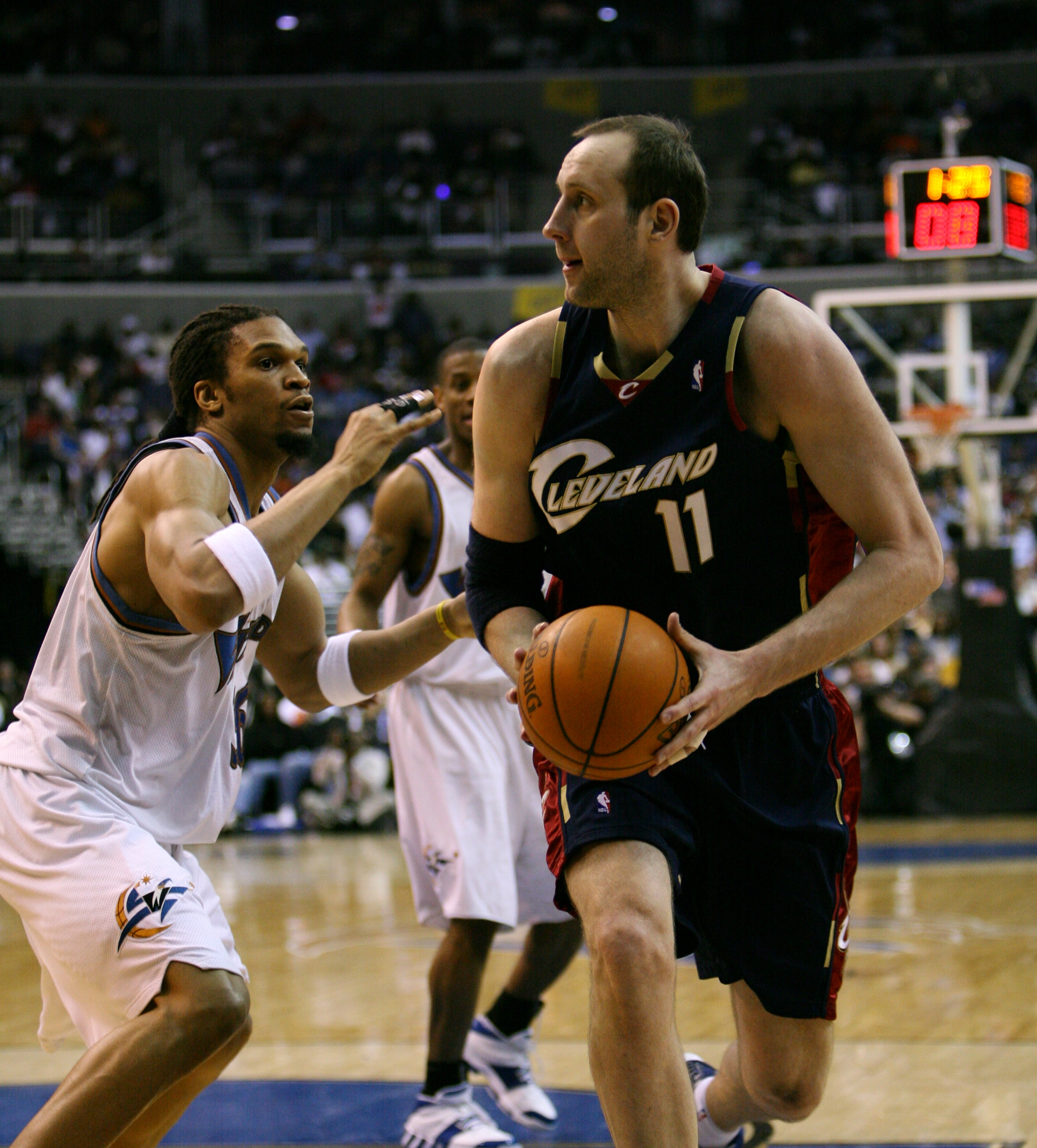 Žydrūnas Ilgauskas